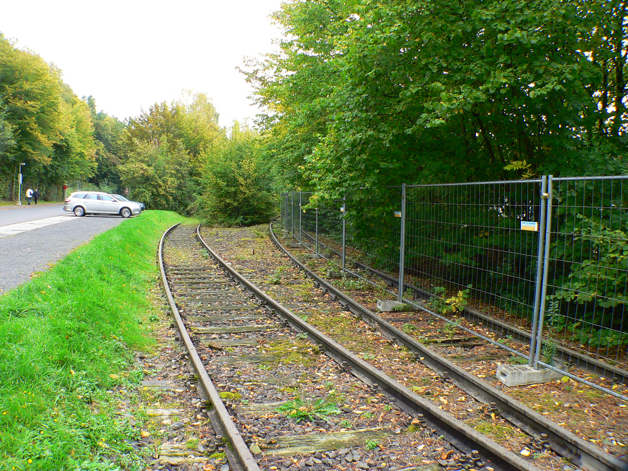 Ederseebahn: Ende der Strecke in Hemfurth-Edersee am Pumpspeicherkraftwerk Waldeck 1 der E.On AG. Links ehem. Abzweig Betriebsgleis zur Edersee-Staumauer.